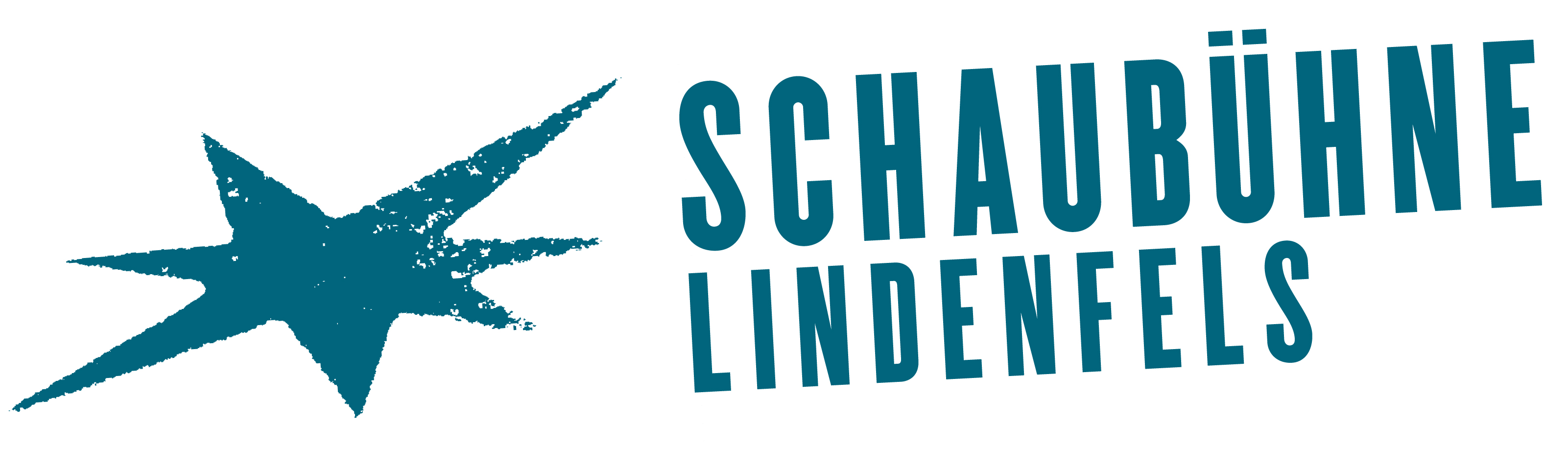 Aktuelles Logo der Schaubühne Lindenfels